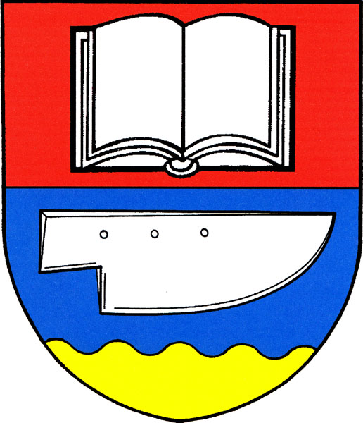 Znak obce Štěpánovice v okrese Brno-venkov